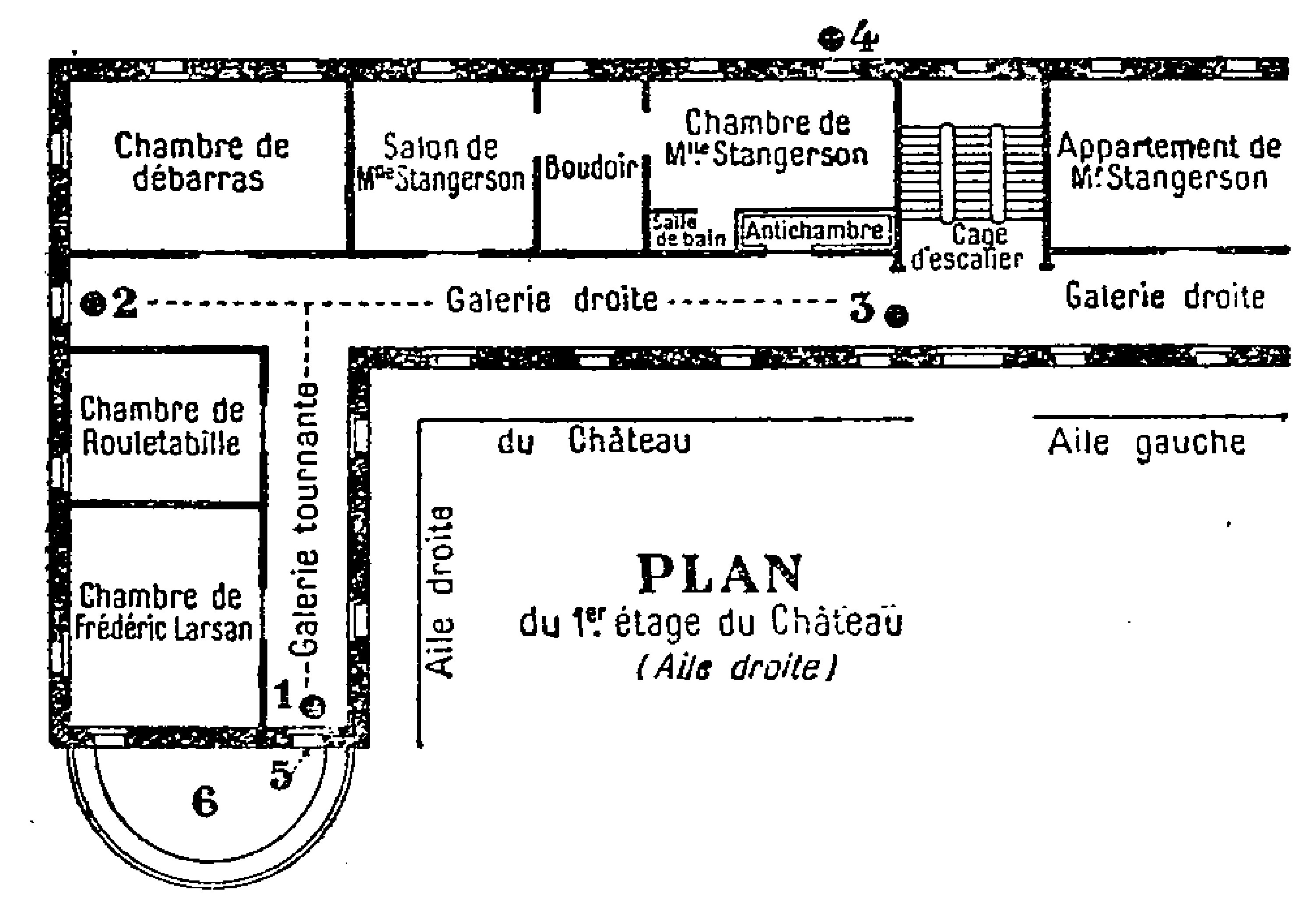 Livre pour Wikisource